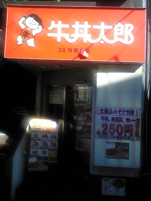 牛丼太郎代々木店